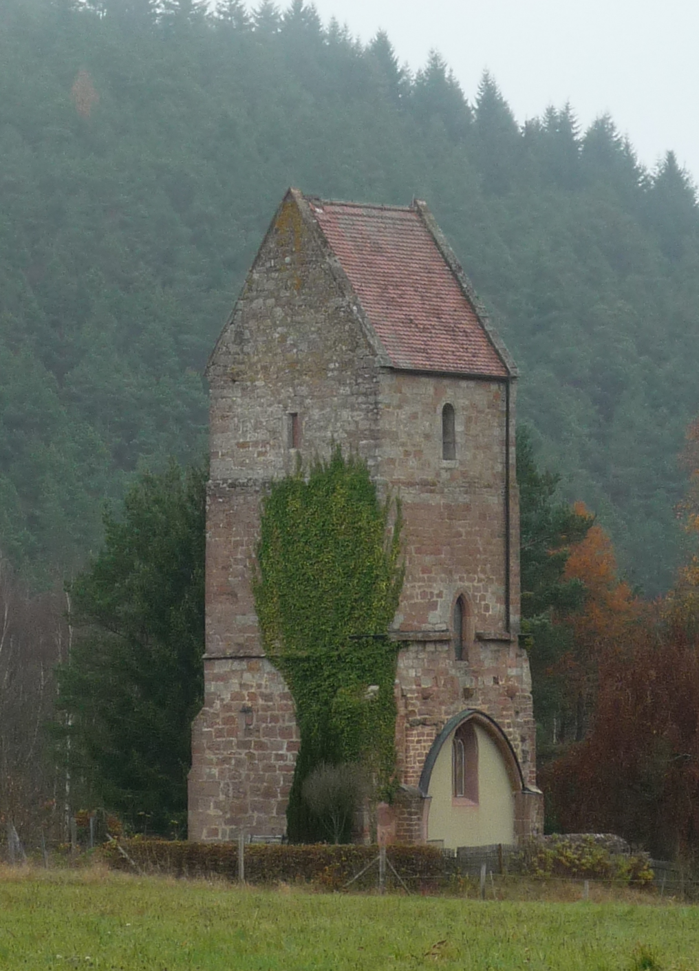 spätgotischer Kirchturm in Aschbacherhof/Rheinland-Pfalz/Germany